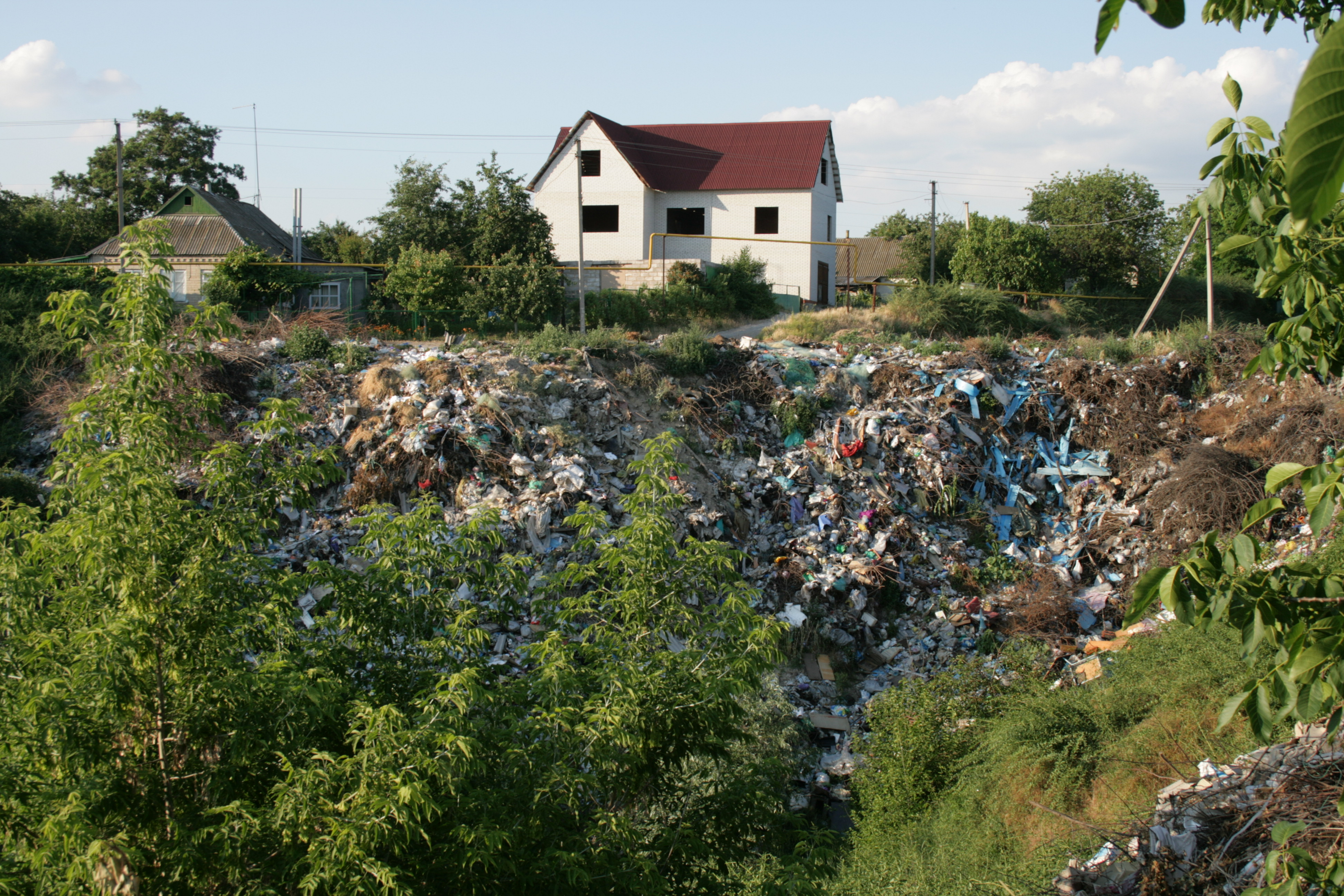 Несанкционированная свалка в центре Кушугума.